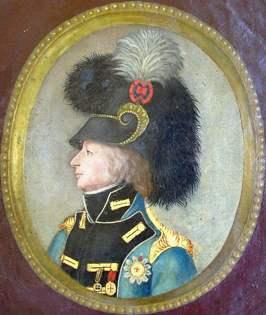 Frame in trompe l'oeil